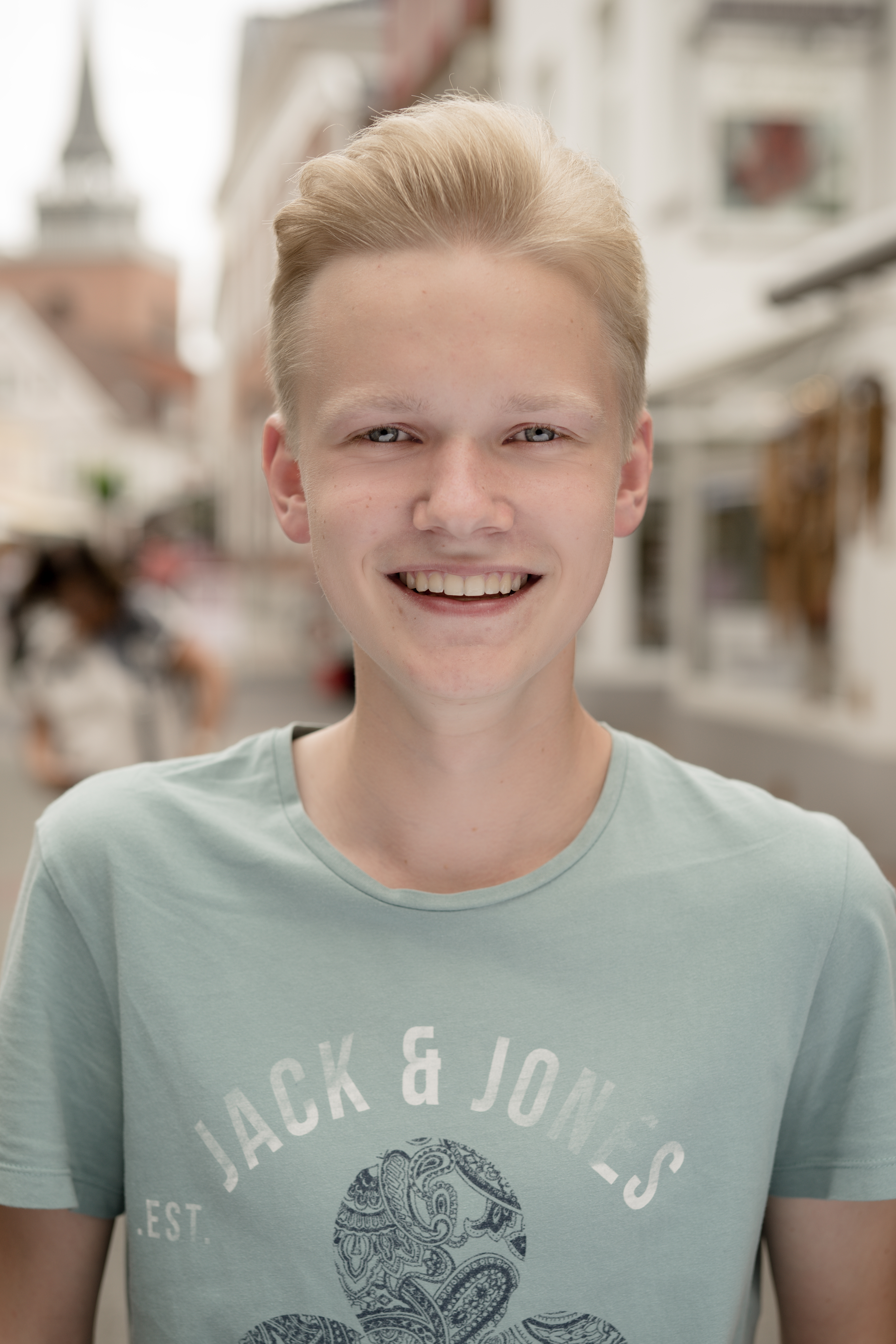 Niklas Bohlen im Portrait